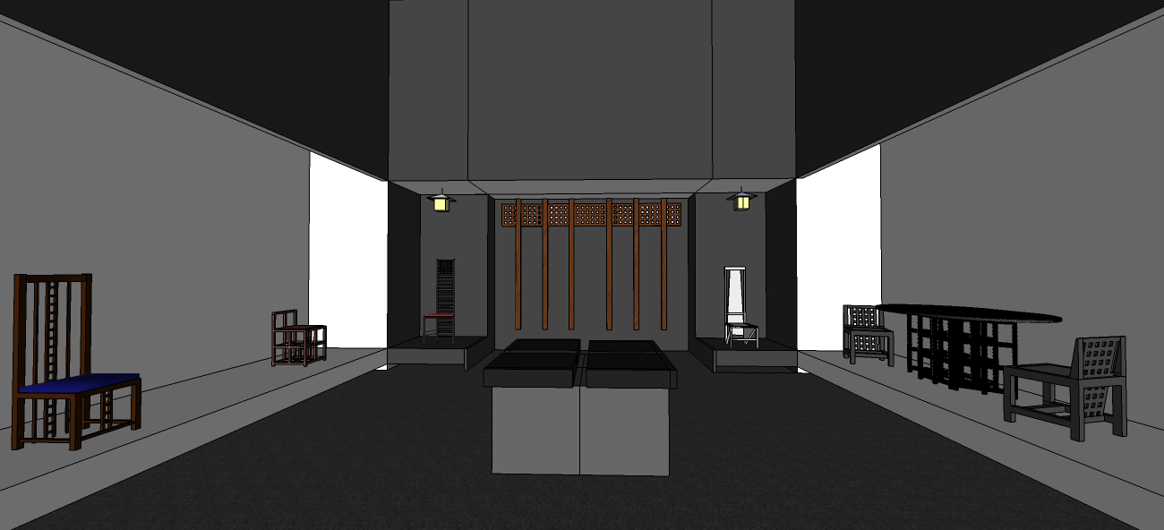 Vista centrale della sala ove sono esposte le sedie di Charles Rennie Mackintosh, allestita con la collaborazione dell'arch. Filippo Allison, presentata all'interno delle Sezioni Nazionali alla XV edizione della Triennale di Milano